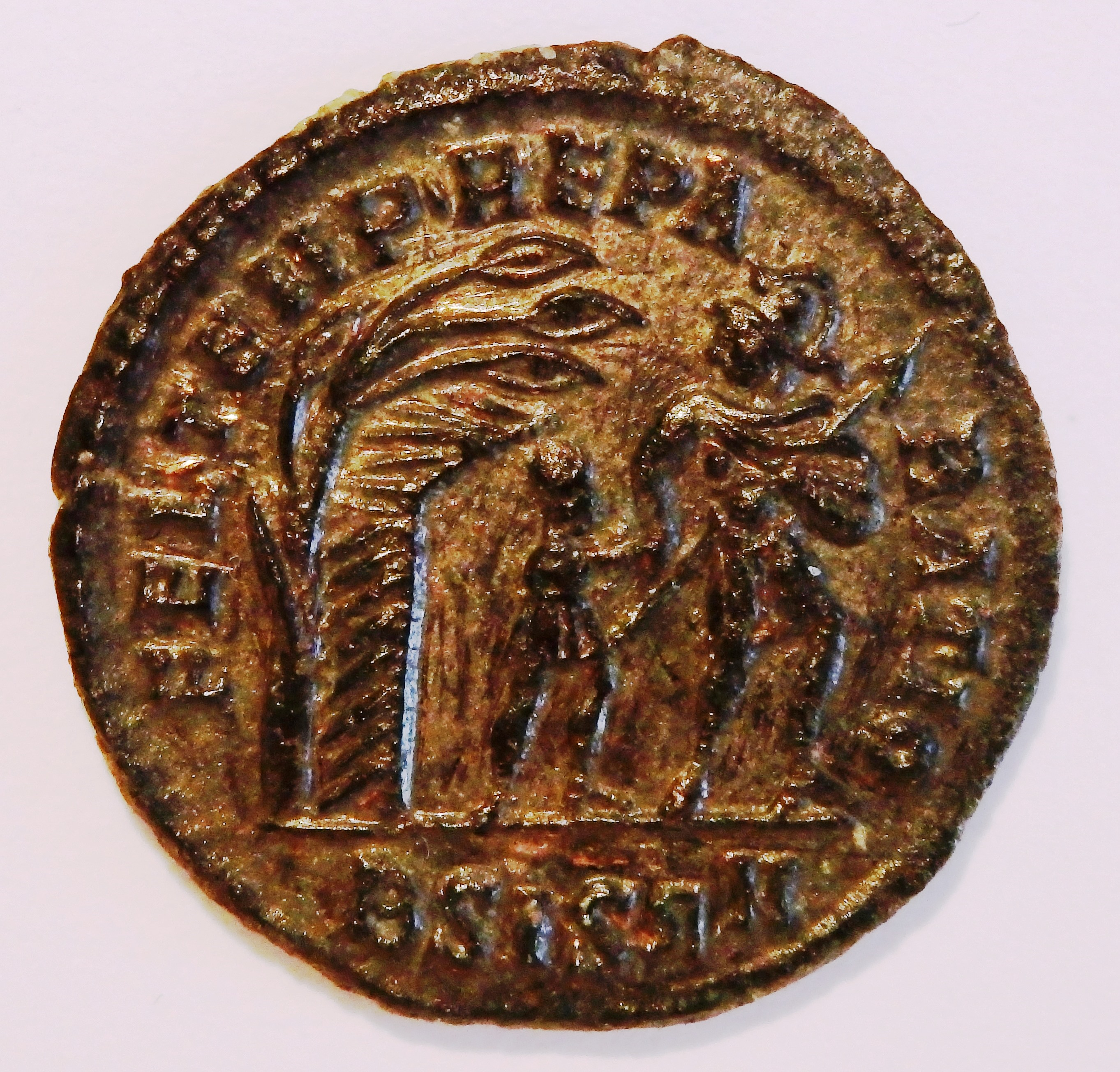 Legionär führt kleinen Franken aus Hütte weg, römische Münze, Kampmann 147.89.2